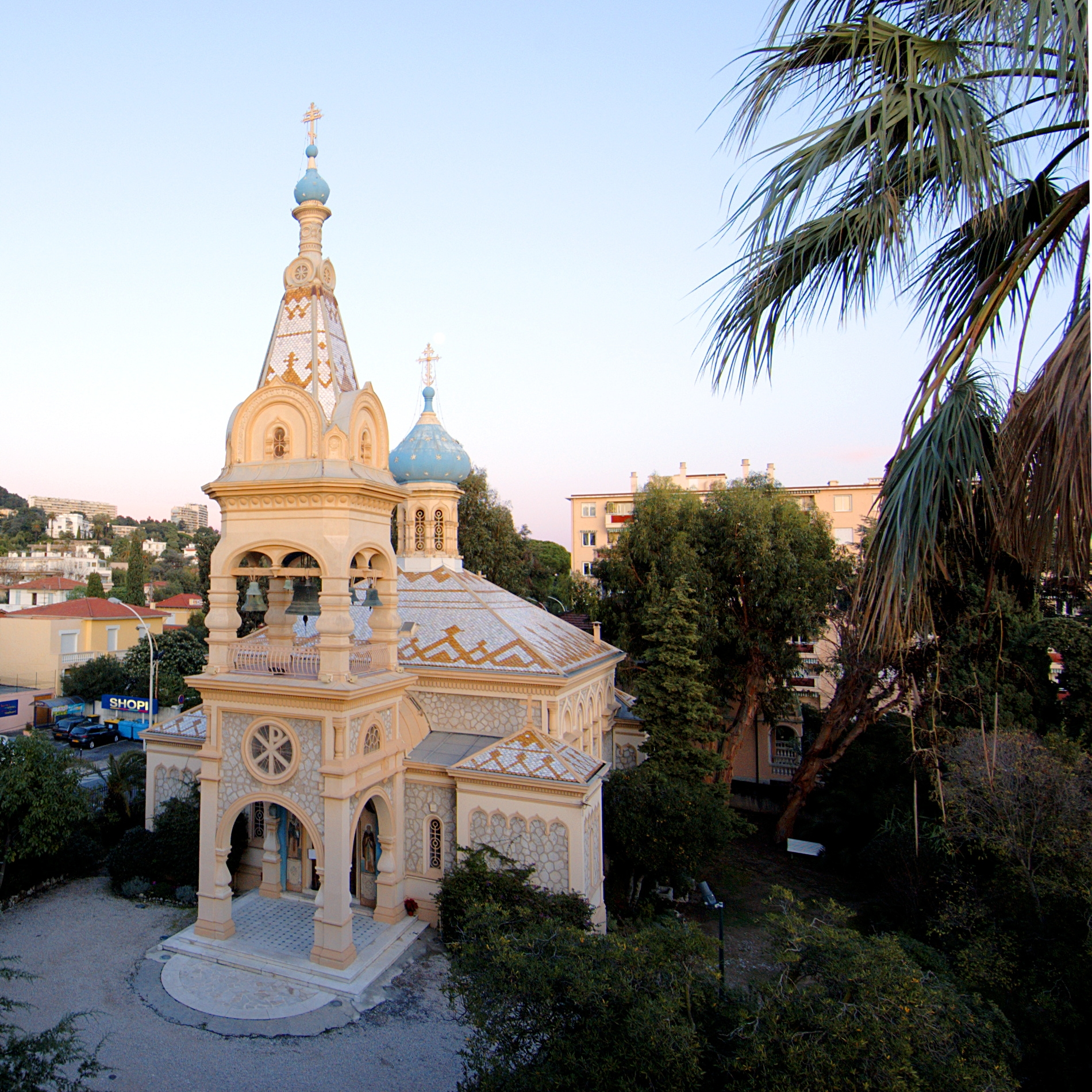 Михаило-Архангельский храм в Каннах (1894) на закате последнего дня ноября.